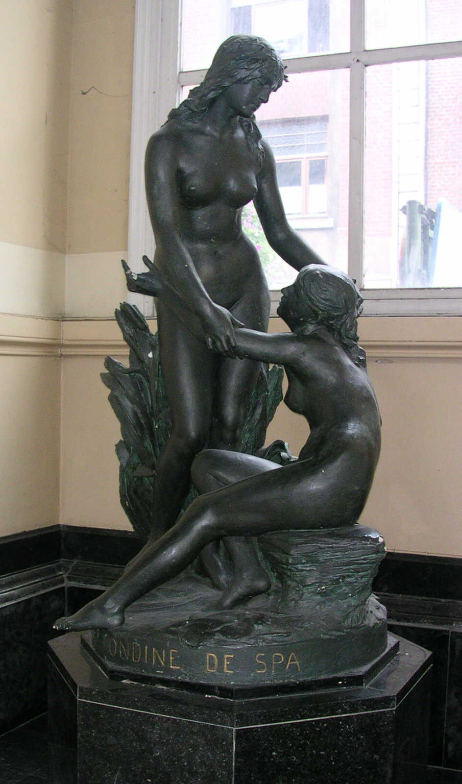 Spa (Belgique), Pouhon Pierre-Le-Grand, sculpture "Ondine de Spa"